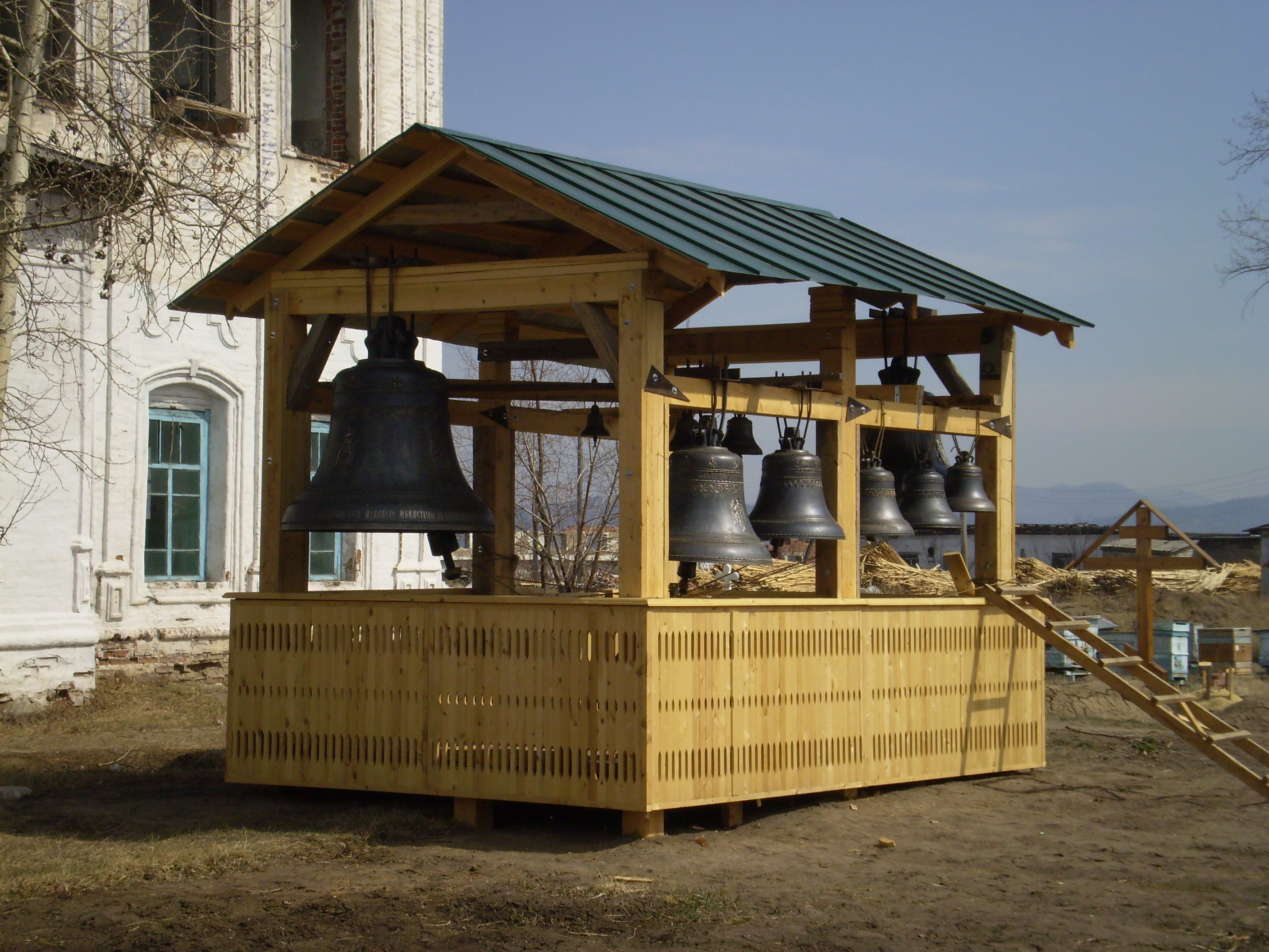 Свято-Троицкий Селенгинский мужской монастырь. Колокола.